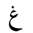 Der arabische Buchstabe Ghain in unverbundener Form.